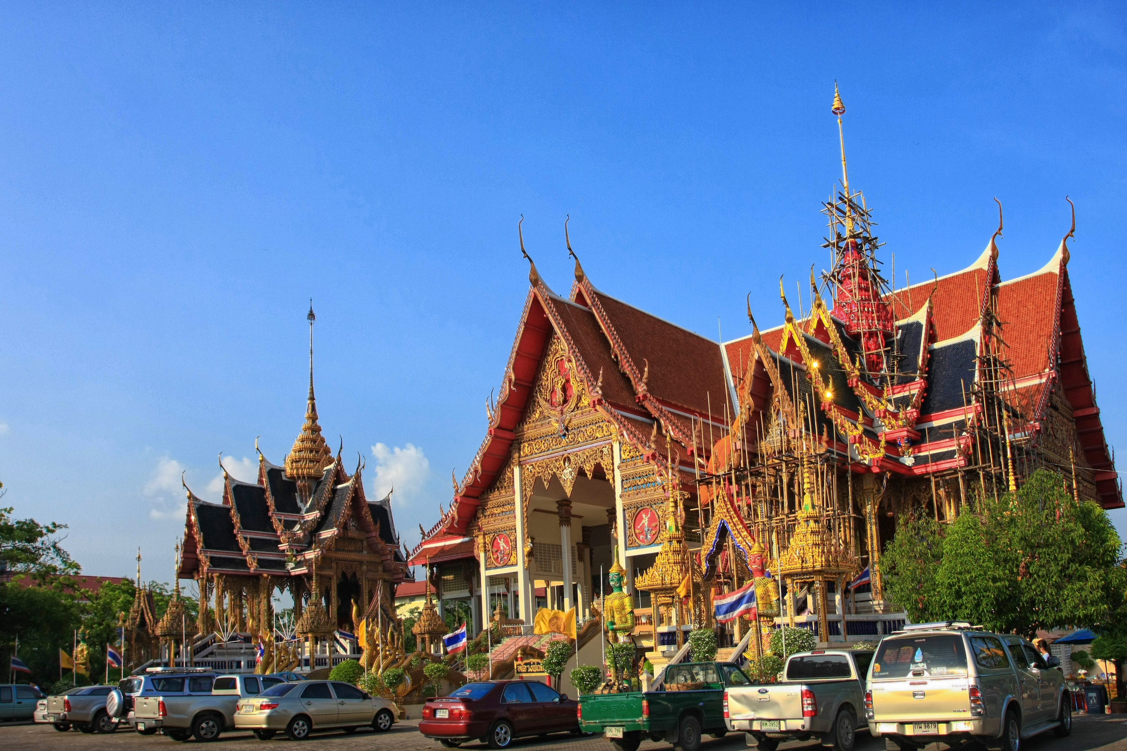 วัดนางสาว